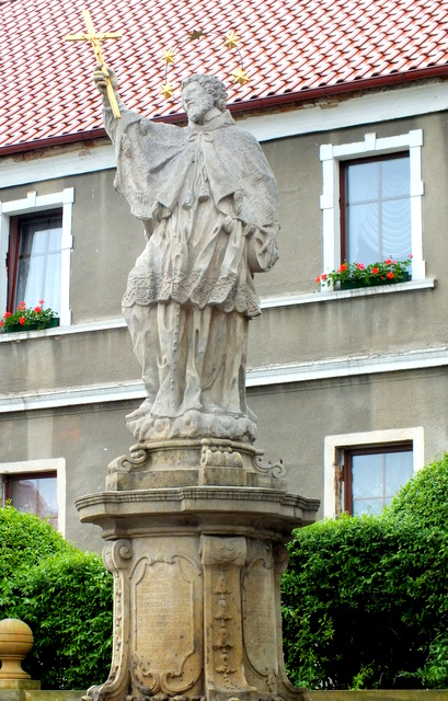 Dobromierz, barokowa XVIII-wieczna figura św.Jan Nepomucena stoi na rynku - placu Wolności. 5,5 m wysokości, cokół z wolutami i tablicami fundacyjnymi.